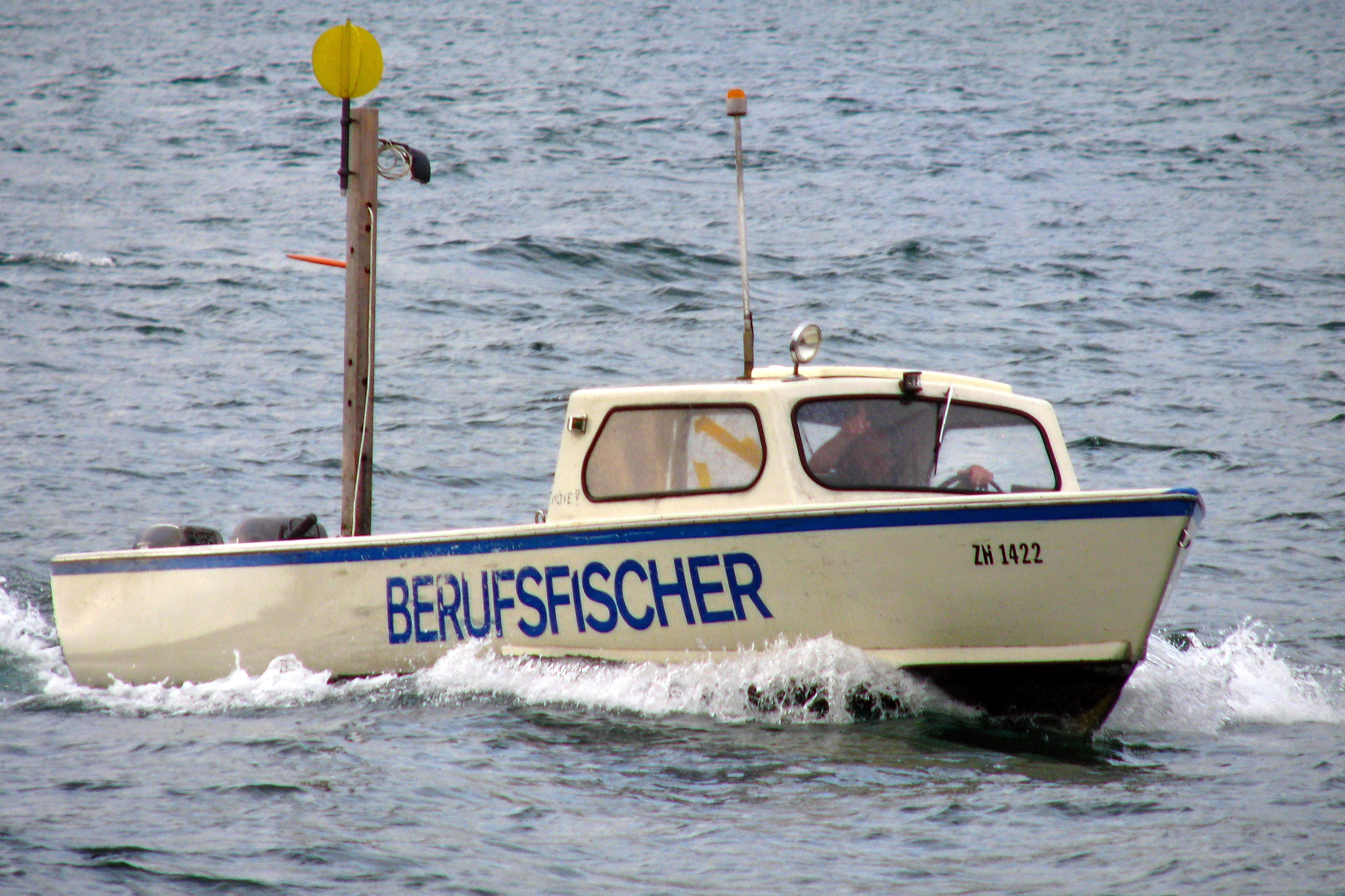 Fishing boat on Lake Zürich (Switzerland)